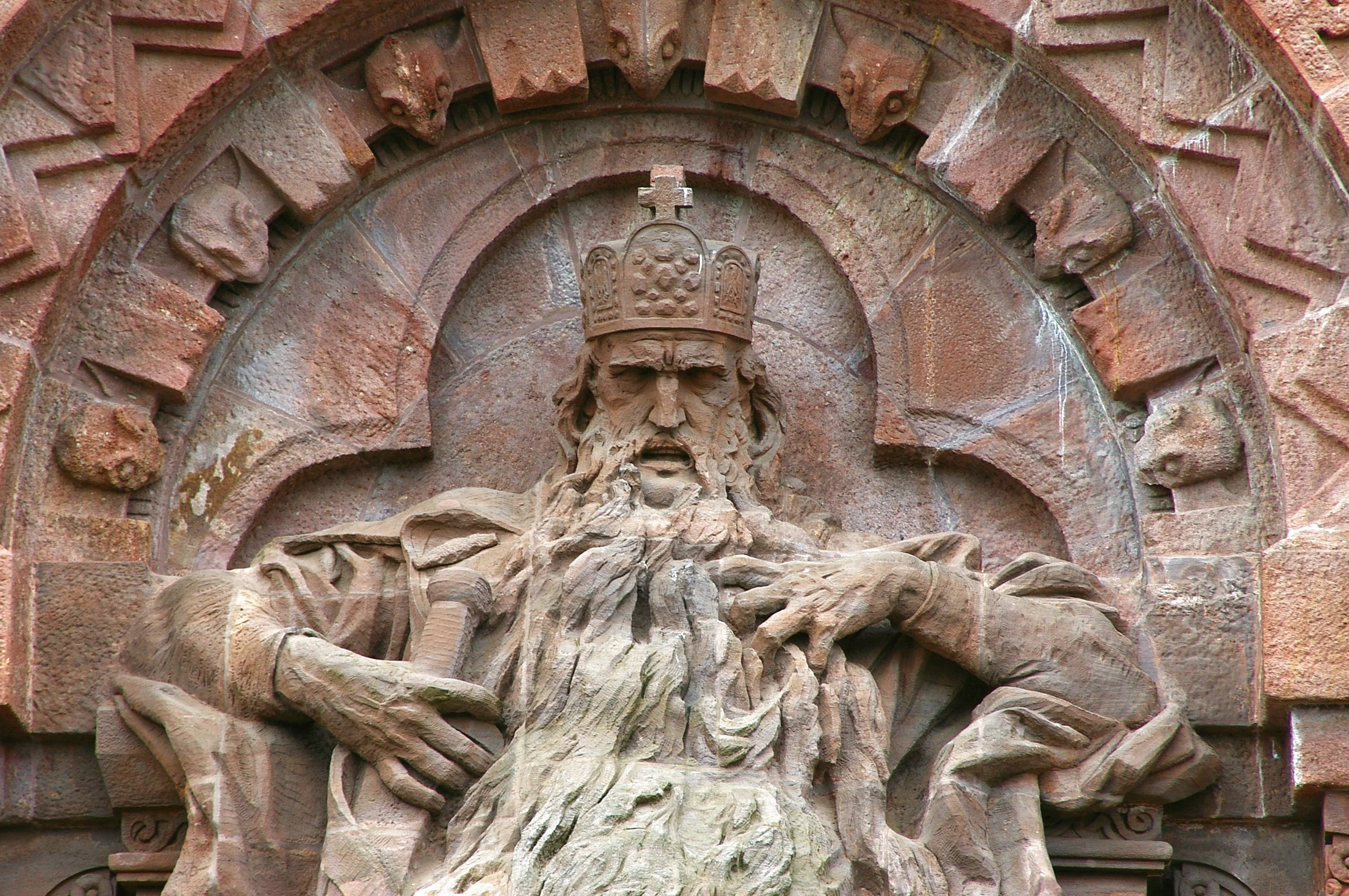 Kyffhäuserdenkmal - Barbarossa - Detail